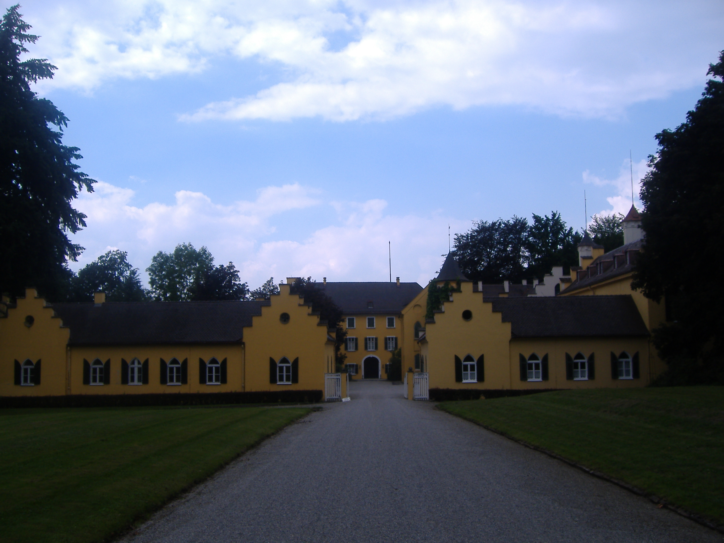 Südseite Schloss Seyfriedsberg